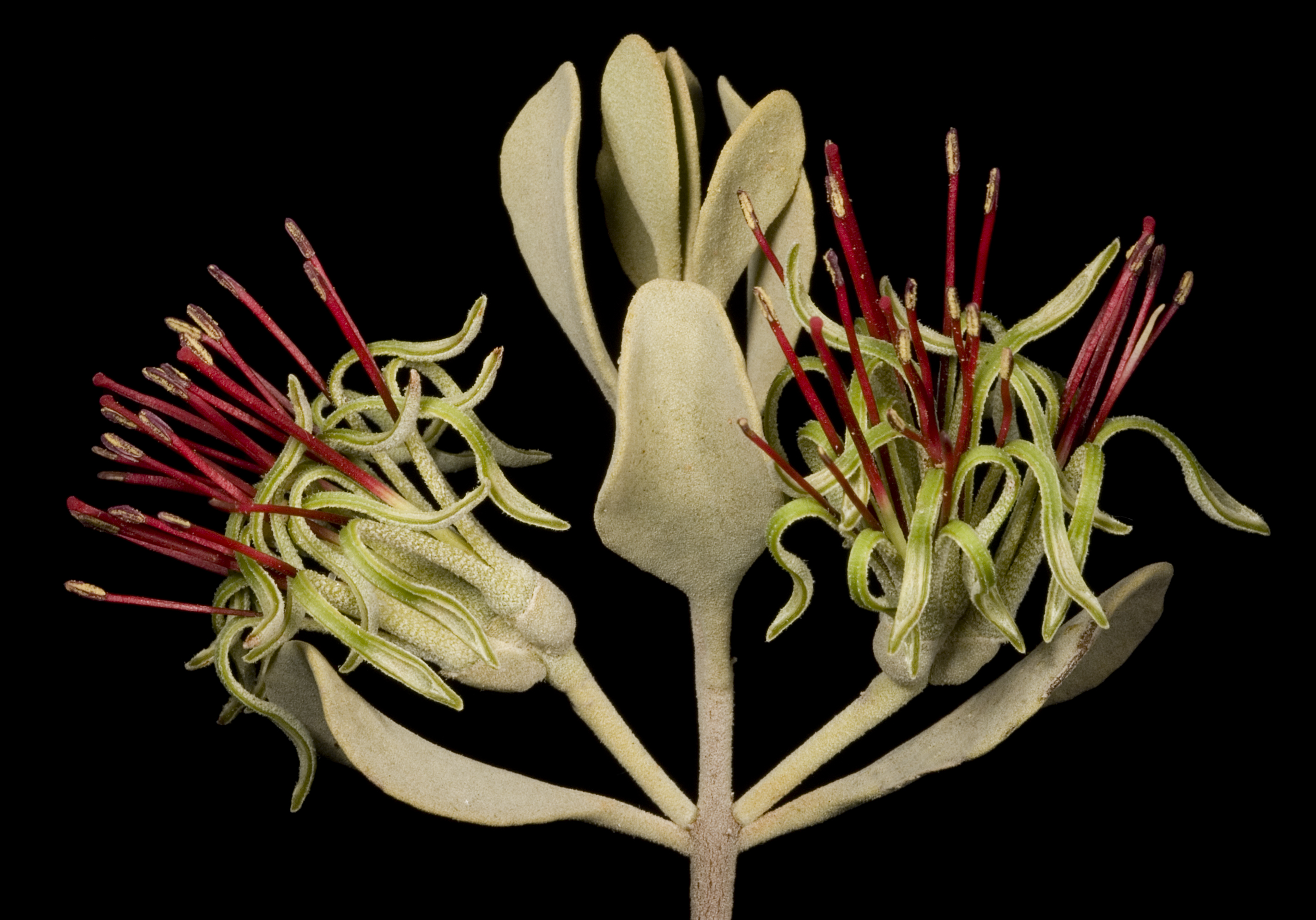 KRT3260